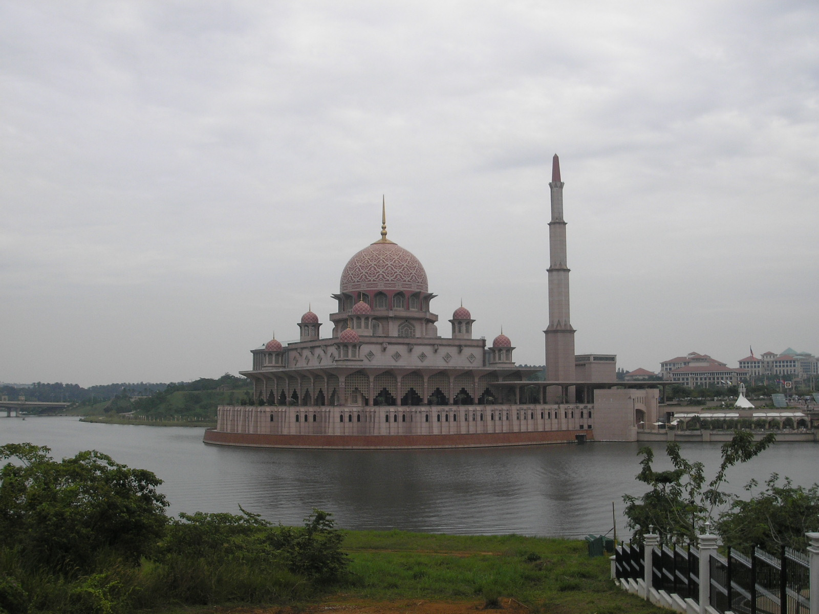 The Masjid Putra in Putrajaya.